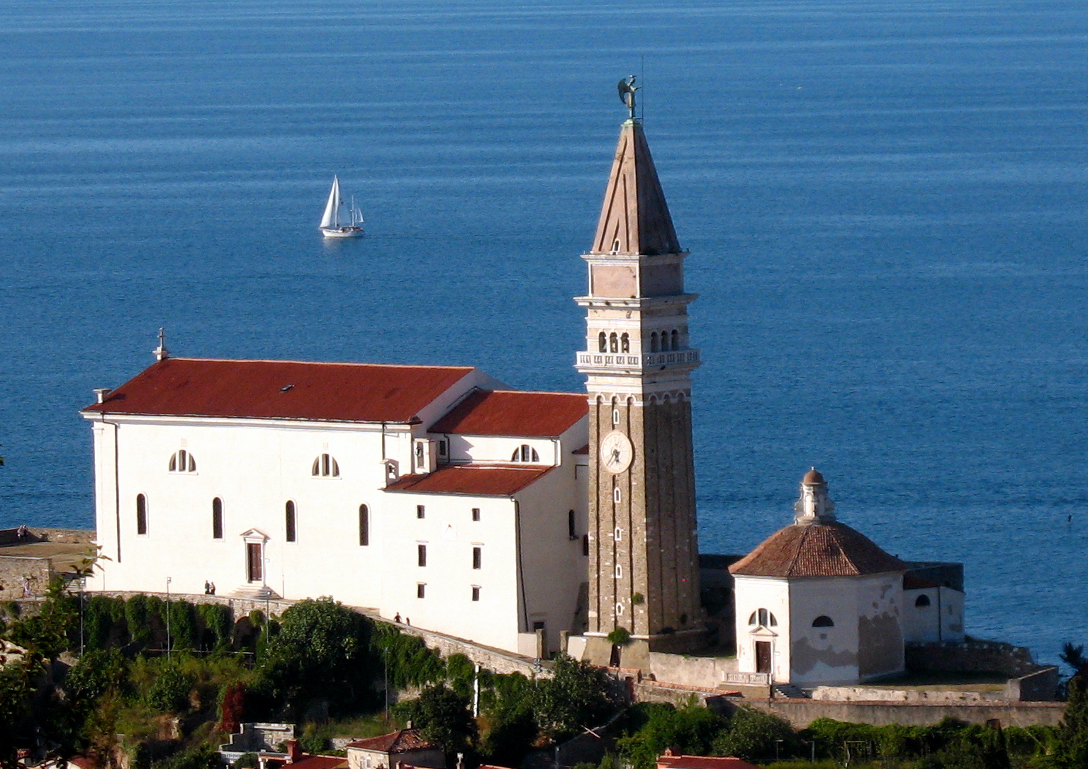 Slowenien, Piran, Kirche St. Georg mit Baptisterium